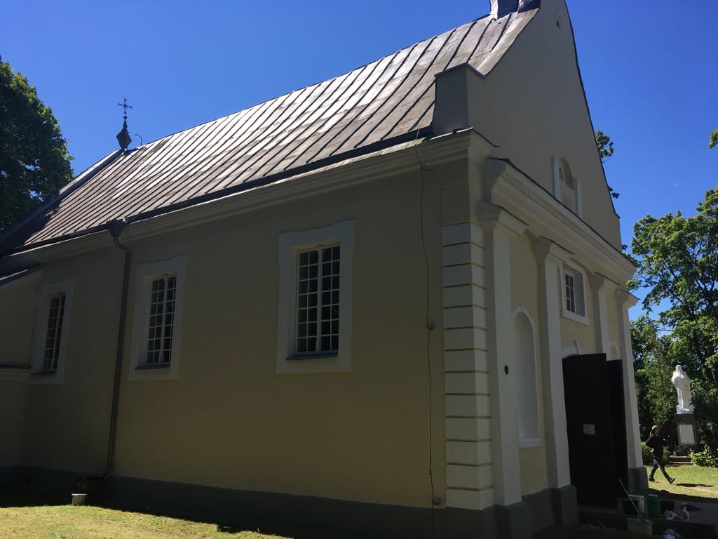 Palėvenėlės bažnyčia